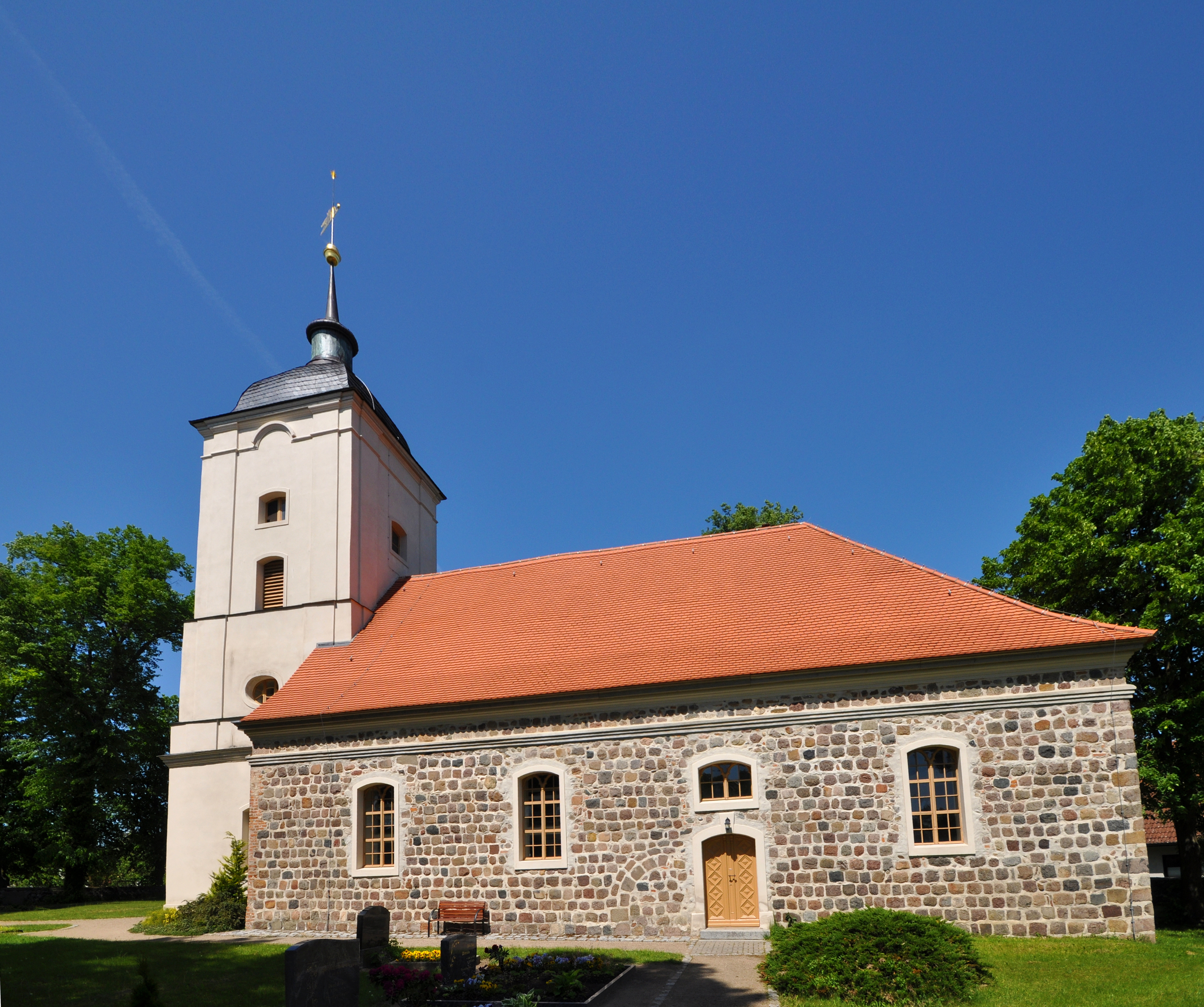 village church in Schmargendorf